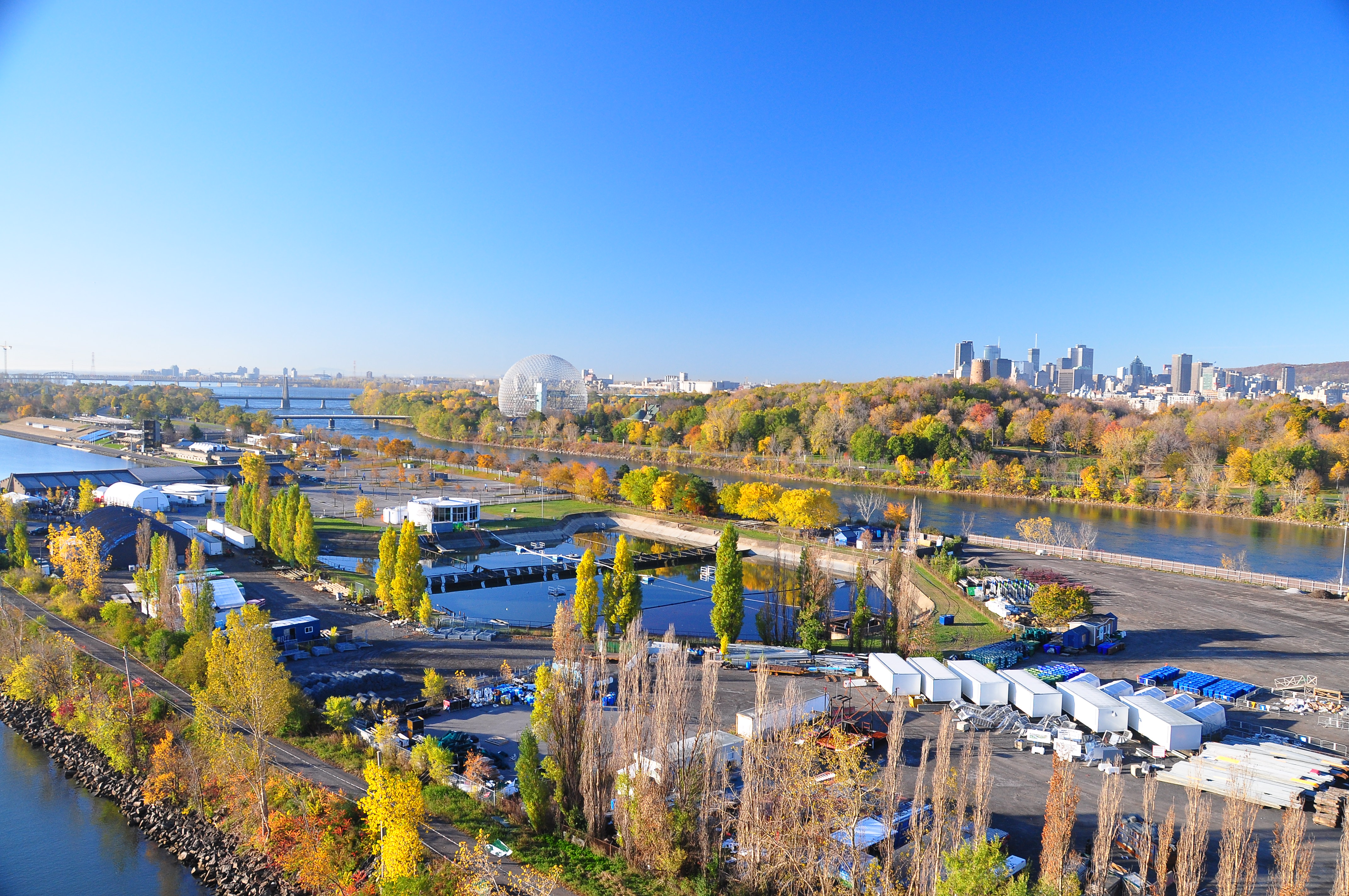 Parc Jean-Drapeau et Montréal